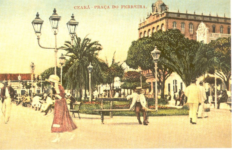 Imagem em cores da Praça do Fereira por volta de 1925 com o Cine Majestic Palace ao fundo